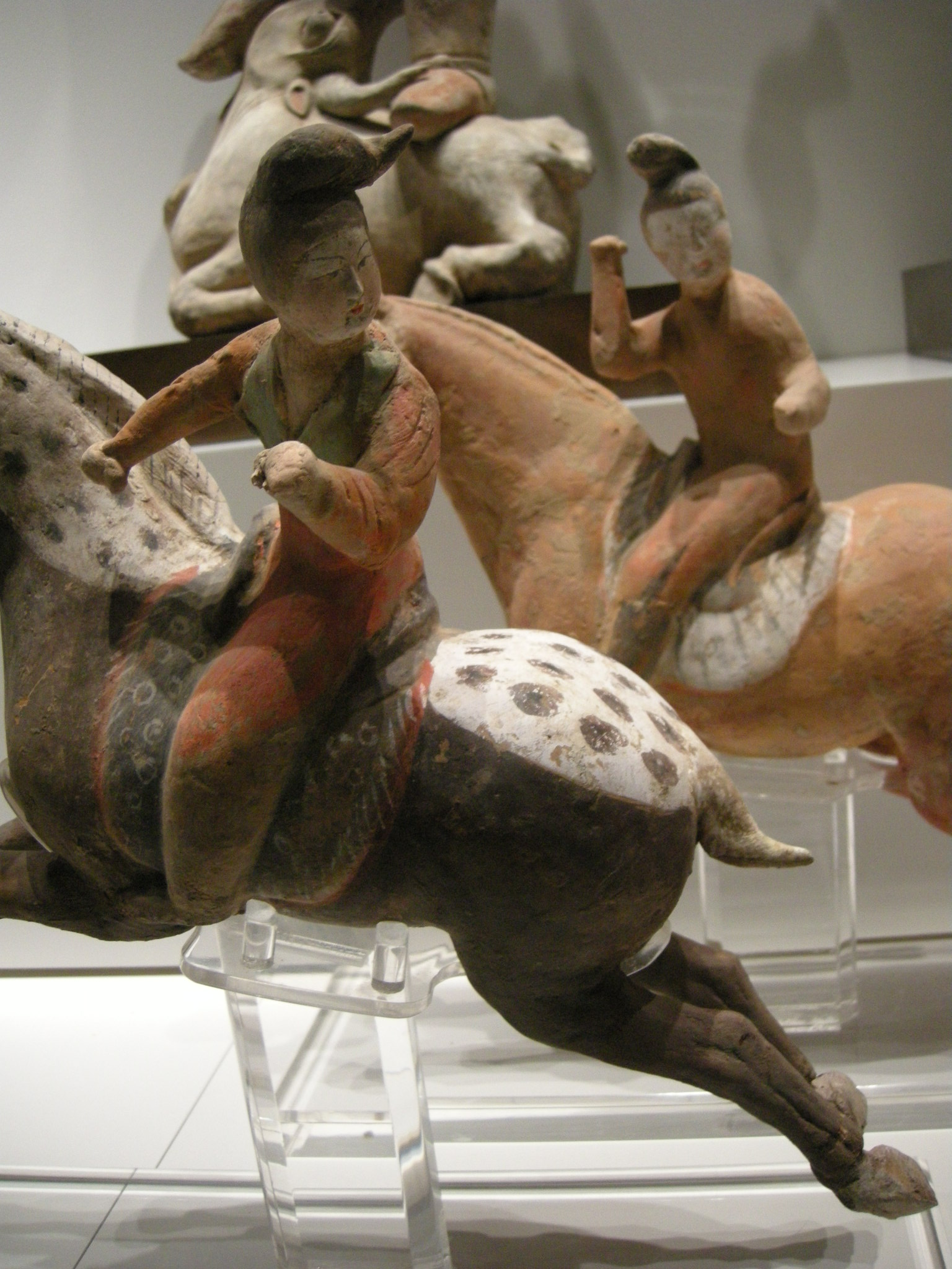 dinastia tang, giocatrici di polo